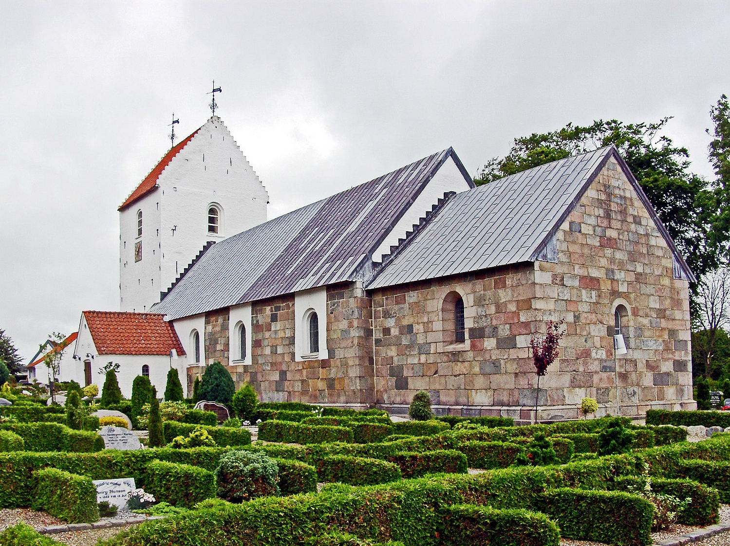 fra sydøst